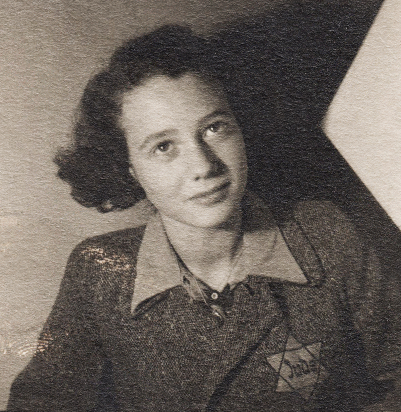 Dita Krausová (* 12. července 1929, Praha) (rozená Edith Polachová) je jedinou dcerou právníka JUDr. Hanse (Hanuše) Polacha a vnučkou Johanna Polacha – politika židovského původu a německé národnosti – meziválečného senátora Národního shromáždění. Přežila holocaust a v roce 1947 se v Praze provdala za českého spisovatele, učitele anglického jazyka a grafologa Otu B. Krause. Po legálním odchodu s manželem a synem do Izraele v roce 1949 pracovala v Netanji jako učitelka pedagogiky a angličtiny. Po smrti svého manžela (rok 2000) se stará o propagaci a vydávání jeho knih. Část jejího životního příběhu umělecky upravil a literárně zapracoval Antonio González Iturbe do knihy „Osvětimská knihovnice“. Dita Krausová je sama autorkou autobiografického románu „Odložený život“. Foto Dity Polachové z roku 1942.